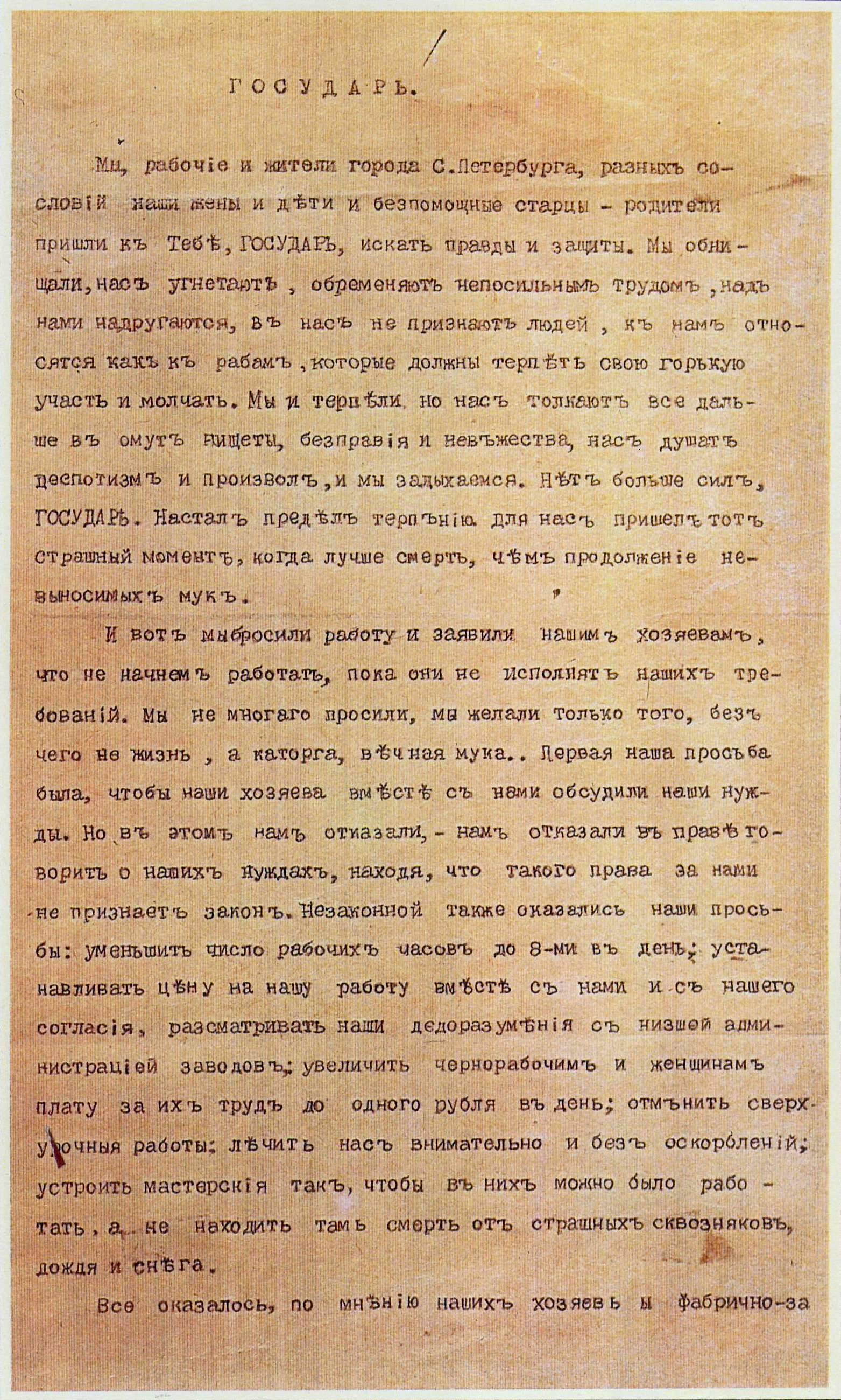 Машинописный текст Петиции рабочих и жителей Санкт-Петербурга, с которым рабочие шли к Зимнему дворцу 9 января 1905 года